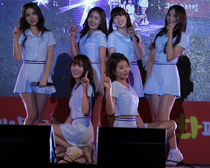 여자친구(GFRIEND) 러시아 문화 페스티벌 인천 연안부두 해양광장